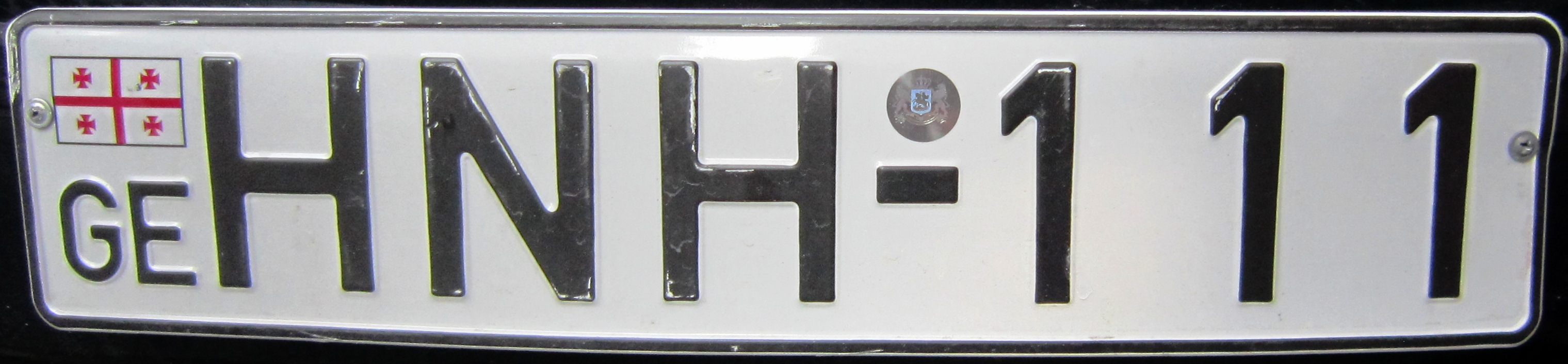 Kentekenplaat uit Georgië